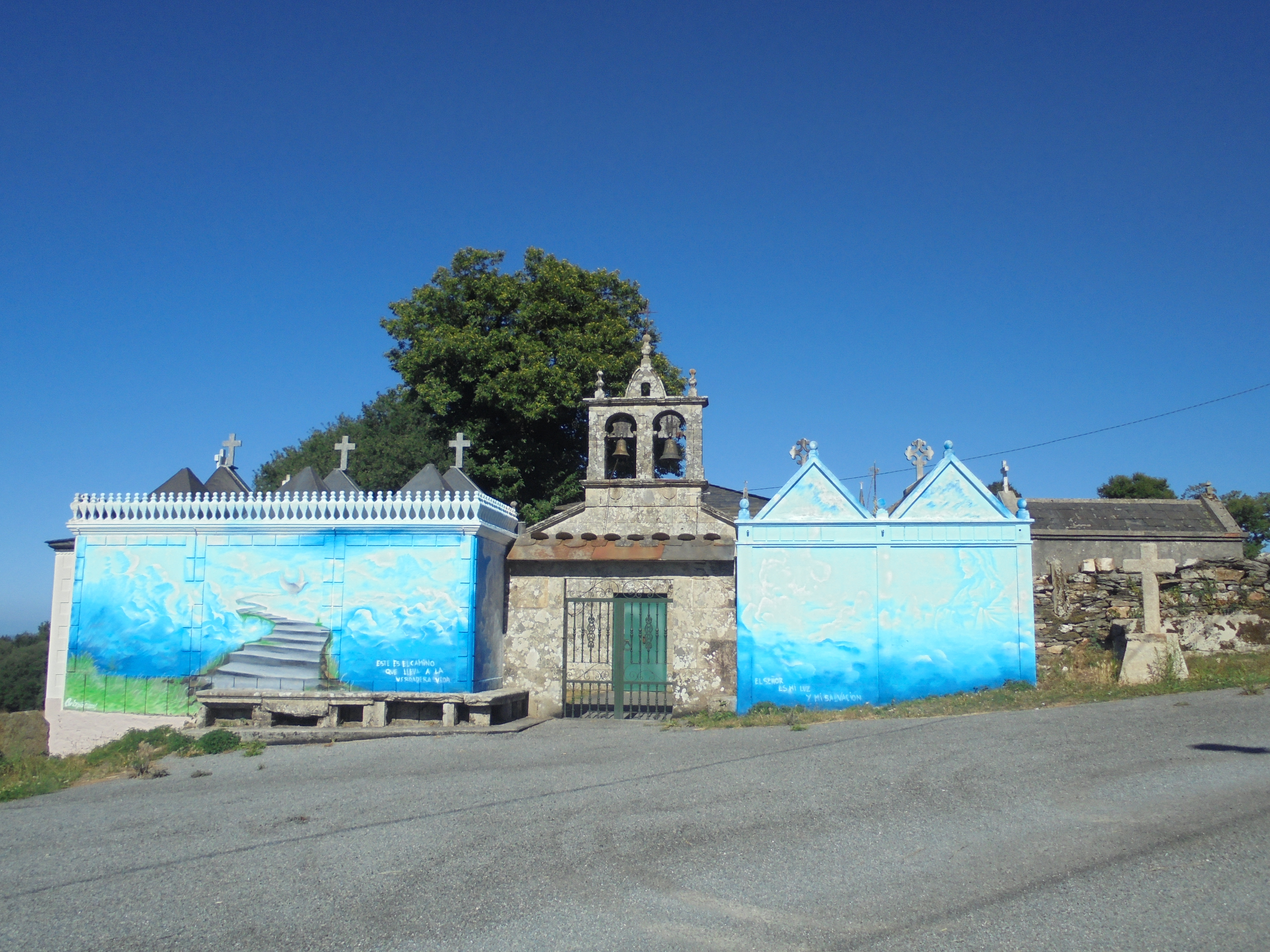 Igrexa parroquial de San Remixio de Bazar ( Lugo)